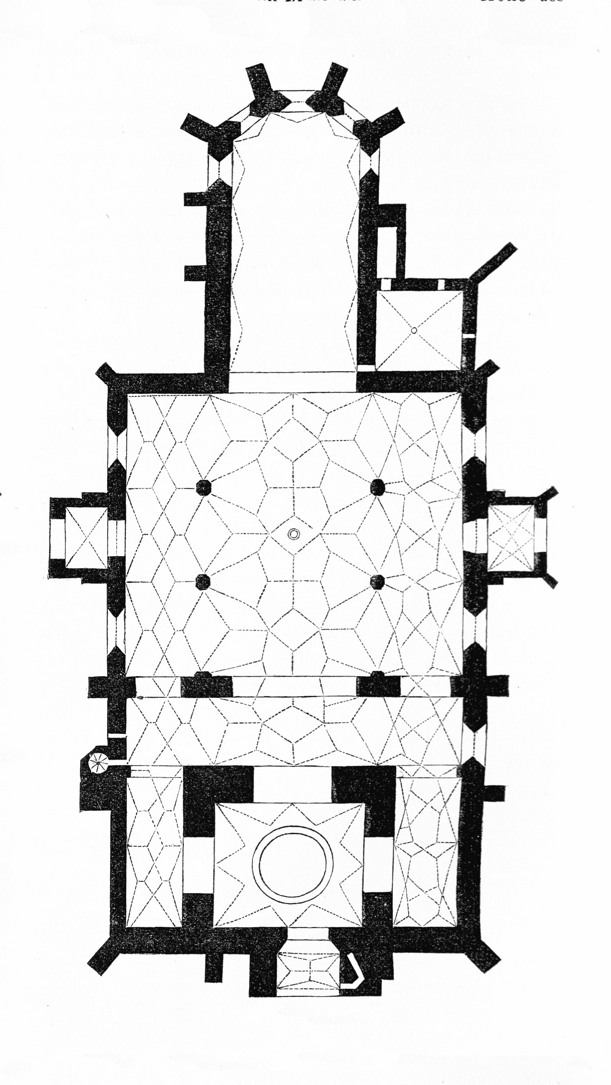 Bilder aus dem in derselben Kategorie befindlichen Artikel aus den Mittheilungen der kaiserl. königl. Central-Commission zur Erforschung und Erhaltung der Baudenkmale Band 1, 1856.